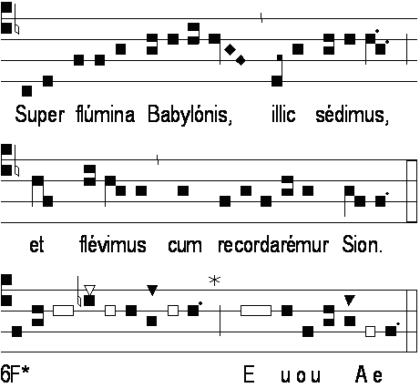 Refrain de "rivers of Babylone" en notation carrée grégorienne (exemple de transcription)